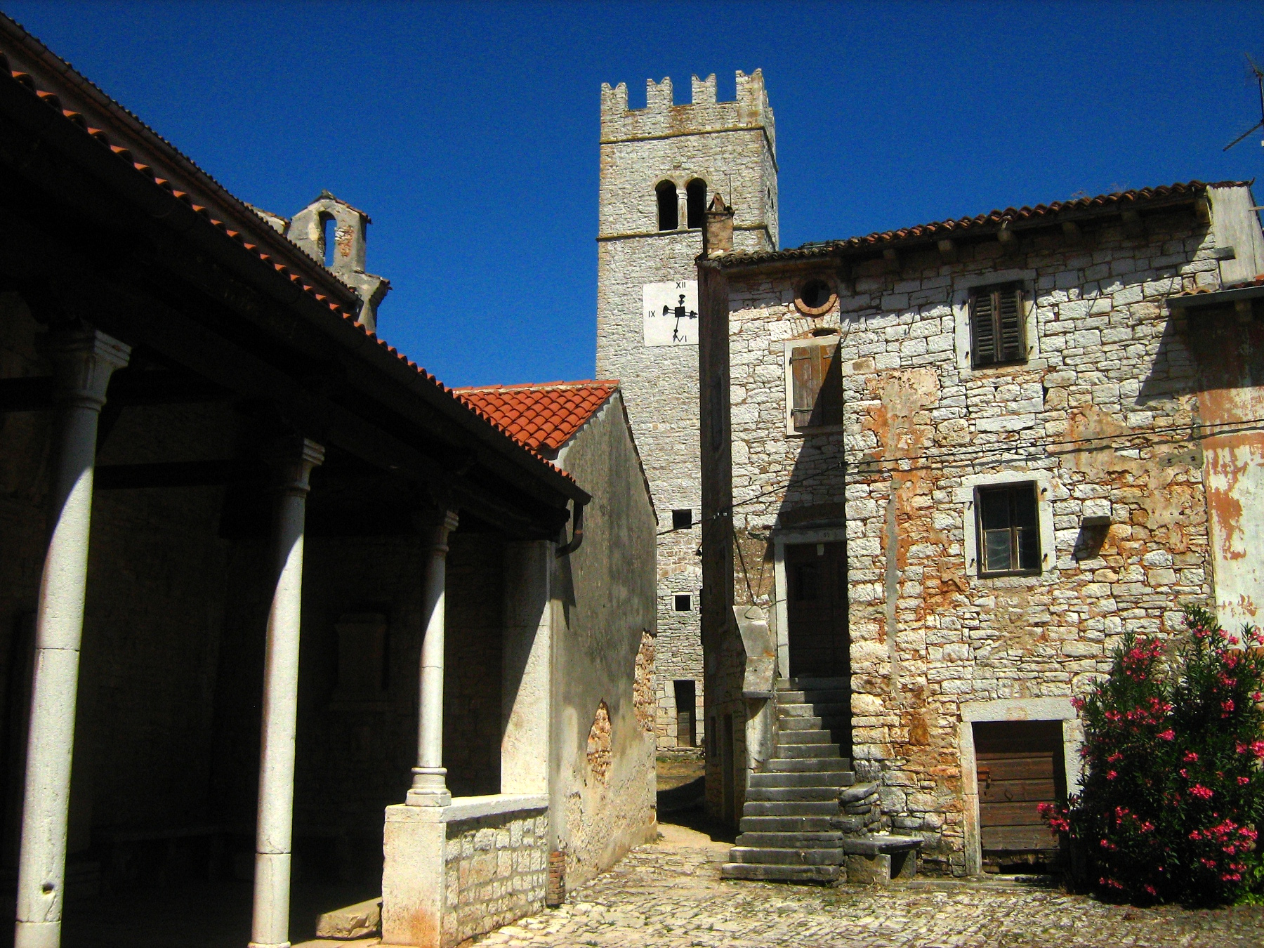 Sveti Lovreč, toranj iza crkve sv. Martina